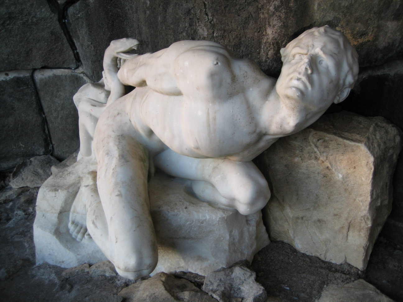 "Lokes straff", "Loki's punishment" by Ida Matton 1923, Stockholms stadshus